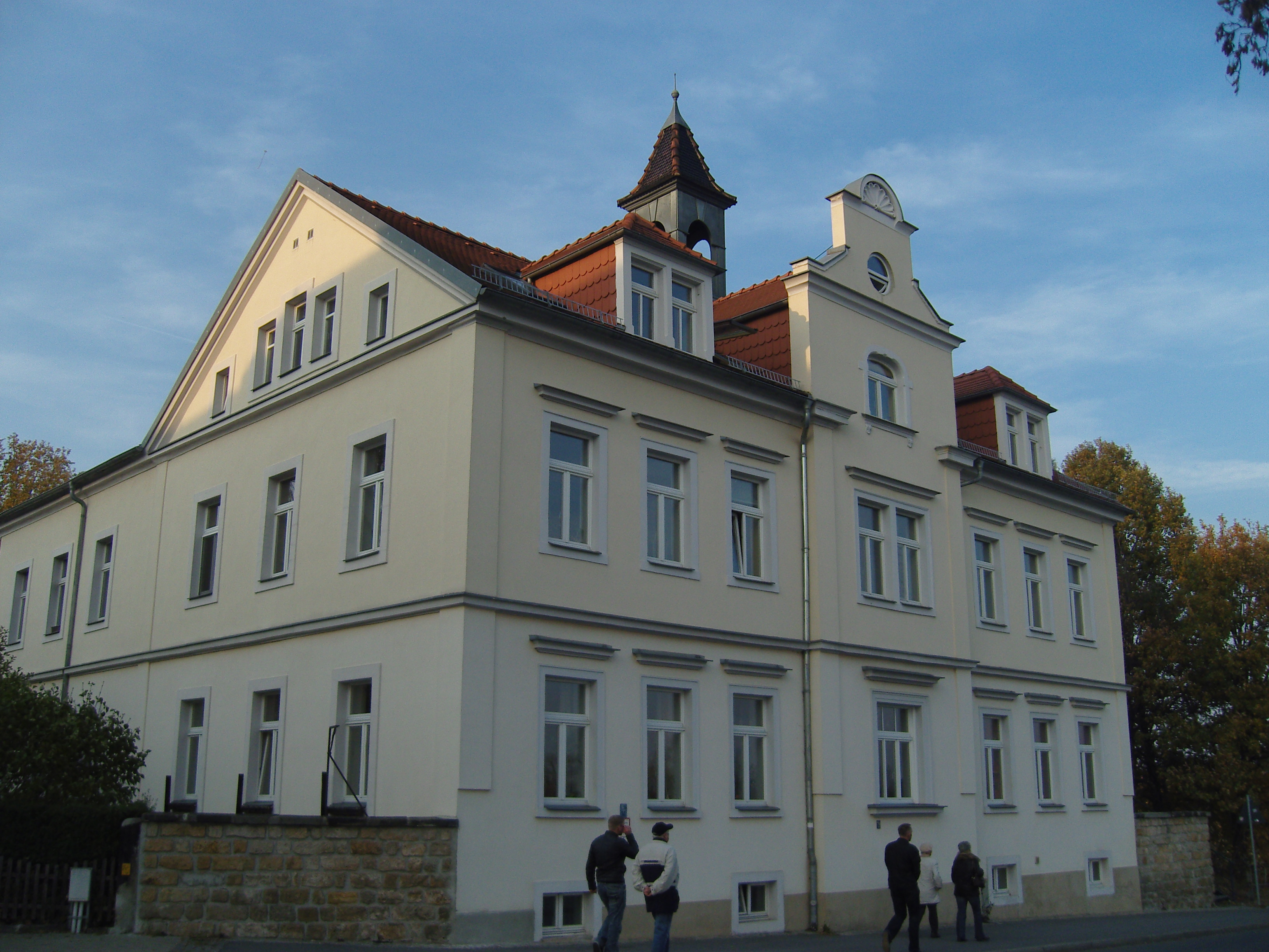 Denkmalgeschütztes Mietshaus in der Scharfenberger Straße 2 in Dresden-Mickten